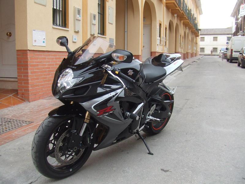 moto deportiva